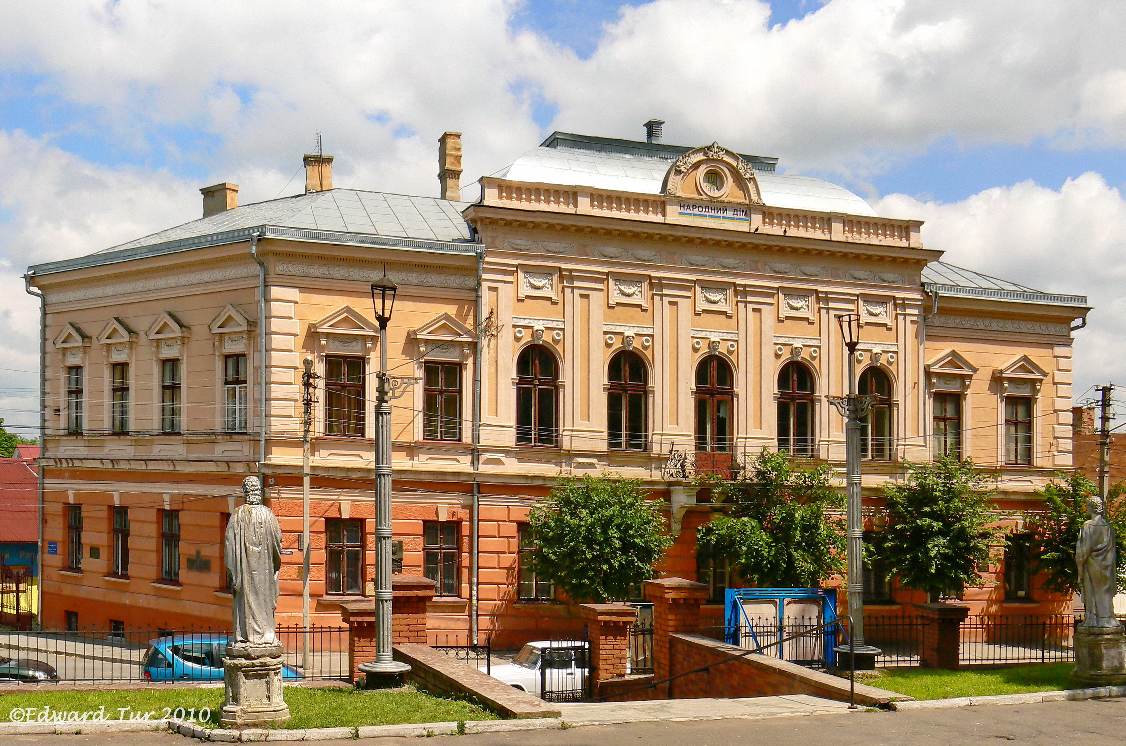 Ukrainian national house